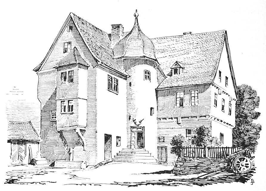 Hofhaus Langendernbach ca. 1907. Gezeichnet von Ferdinand Luthmer.